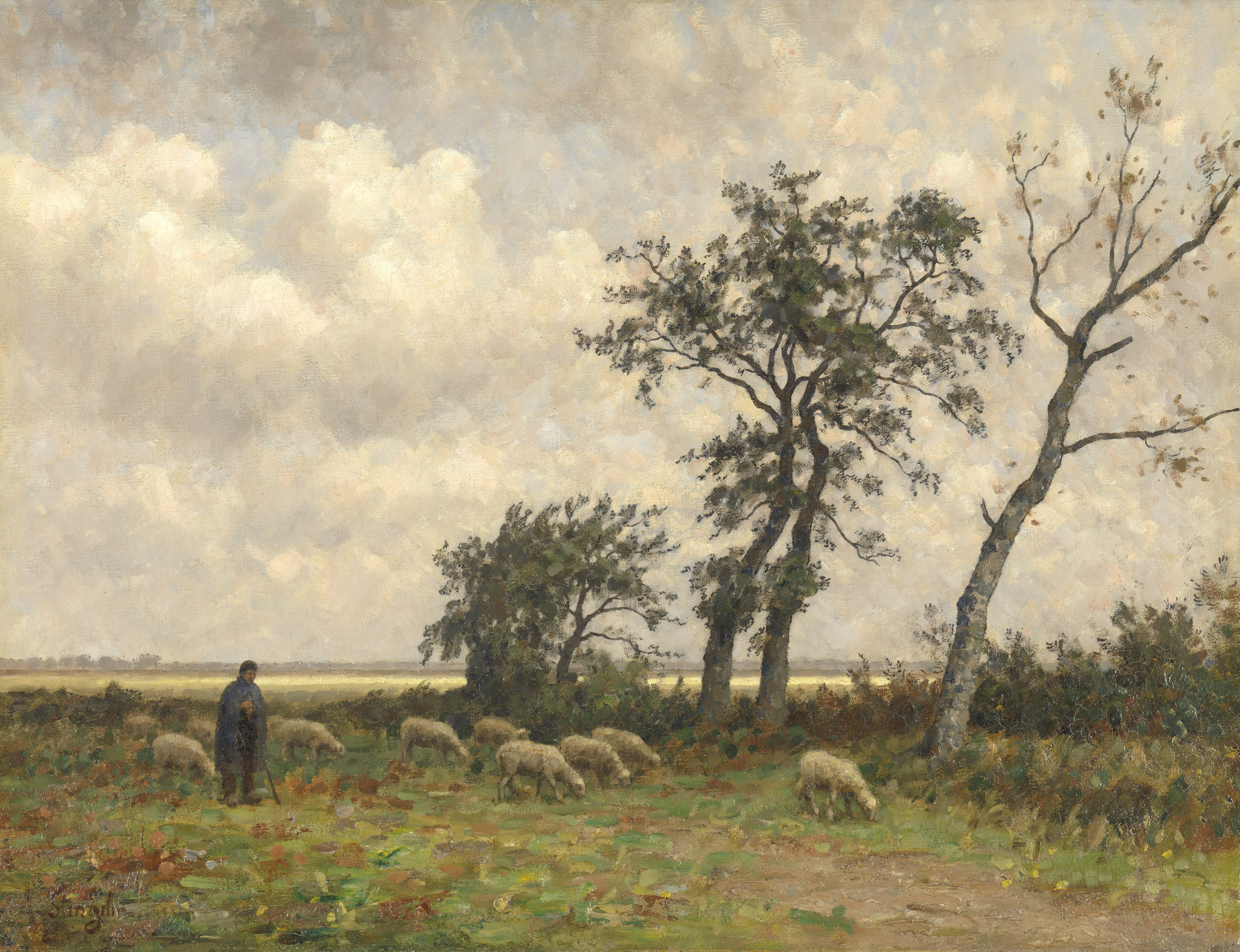 Landschap in Drente. Een herder met een kudde schapen in een landschap met enkele bomen.